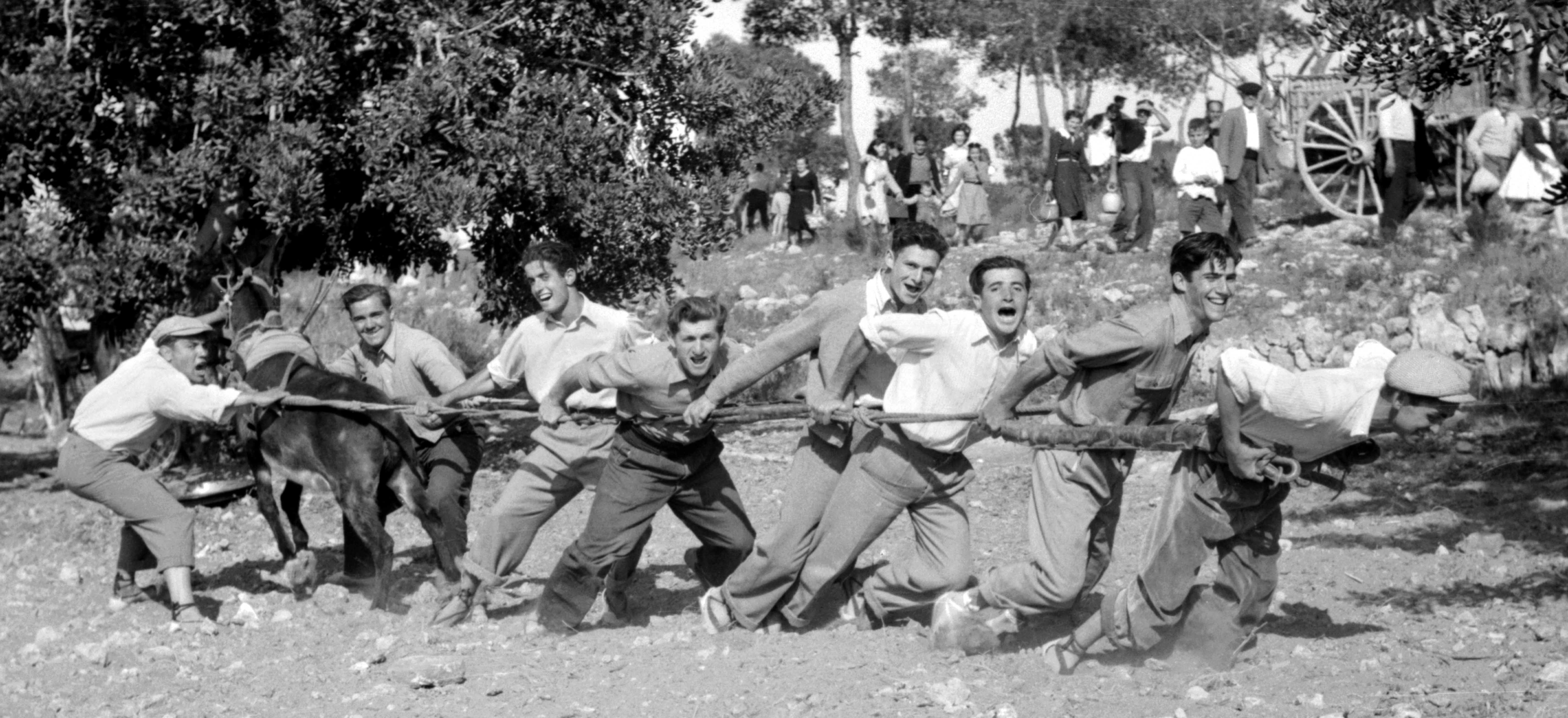 L'Arxiu allibera avui aquesta imatge feta per Ismael Latorre Mendoza en els Arenals amb data 10-04-1955, on actualment s'hi troba la urbanització Ausiàs March. L'indret, de fina sorra, es tracta del vessant nord d'un turonet del terme de Carlet. A l'arxiu s'hi conserven més de 1000 negatius dedicats al lleure durant la Pasqua. Els alginetins jugaven normalment en els Arenals (terme de Carlet): tirant a gat -estirada de corda-, torres humanes -muixerangues-, etc. També ho feien a la Xivana (terme d'Alfarb). Aquesta fotografia es va publicar en: Vidal, Xavier: La partida del cagat, ed. Brosquil edicions, col·lecció Els Ullals de Narrativa, 7; València, 2006. ISBN 84-9795-182-4. Premi Joan Santamaria de Novel·la, 2003. Foto de portada. Fornés, Alberto; Císcar, José i Latorre, Ismael: Alginet, històries, costums i altres relats, Societat Cultural Alèdua, Alginet, 2003. Dipòsit Legal: V-2546-2003, pàgina 65. Levante-EMV La Ribera, imatges de l'Arxiu 17-06-2017 Tractament digital: Carolina Latorre Canet.